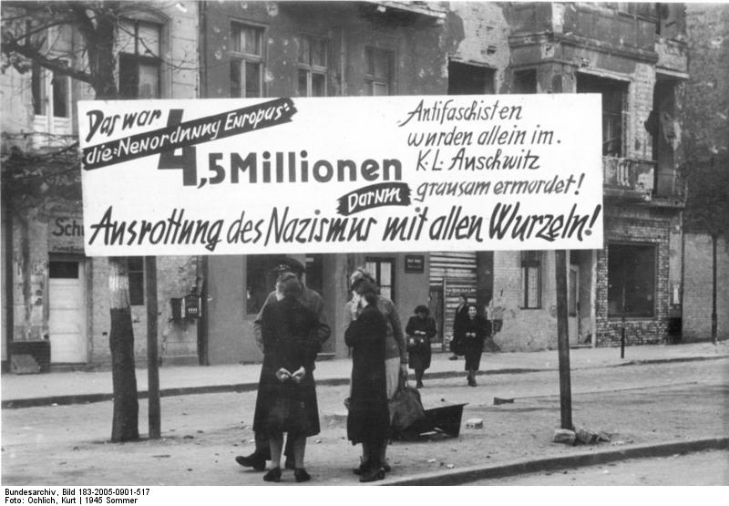 Berlin-Neukölln, Anti-NS-Transparent Illus/Ochlich Berlin Transparent in Neukölln, Hermannstrasse Ecke Warthestrasse. Aufgenommen Sommer 1945 676-47 [Berlin-Neukölln, Hermannstraße Ecke Warthestraße.- Anti-Nationalsozialistisches Transparent: "Das war die Neuordnung Europas. 4,5 Millionen Antifaschisten wuren allein im KL Auschwitz grausam ermordet! Darum Ausrottung des Nazismus mit allen Wurzeln"]